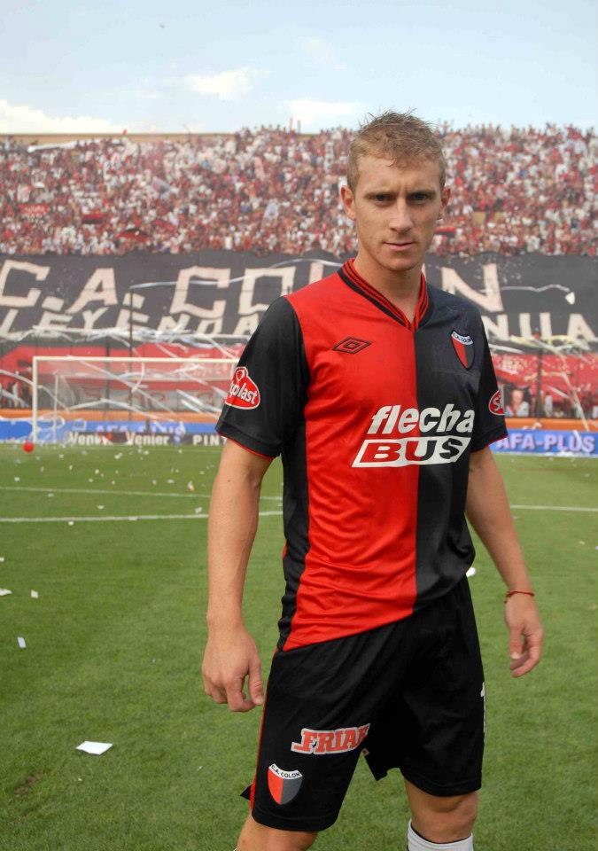 maxi caire colon